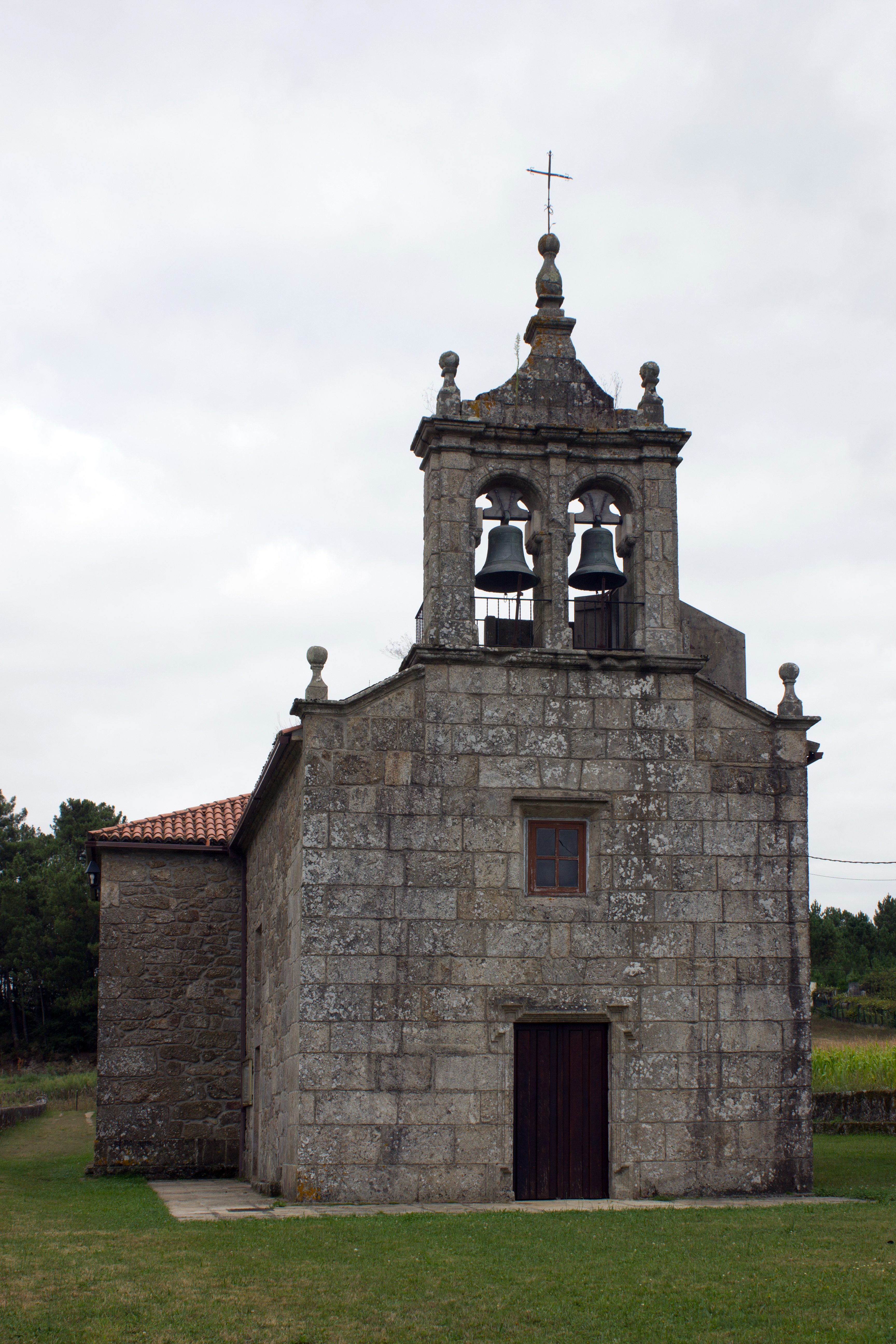 Igrexa de San Miguel de Cora, no concello da Estrada.